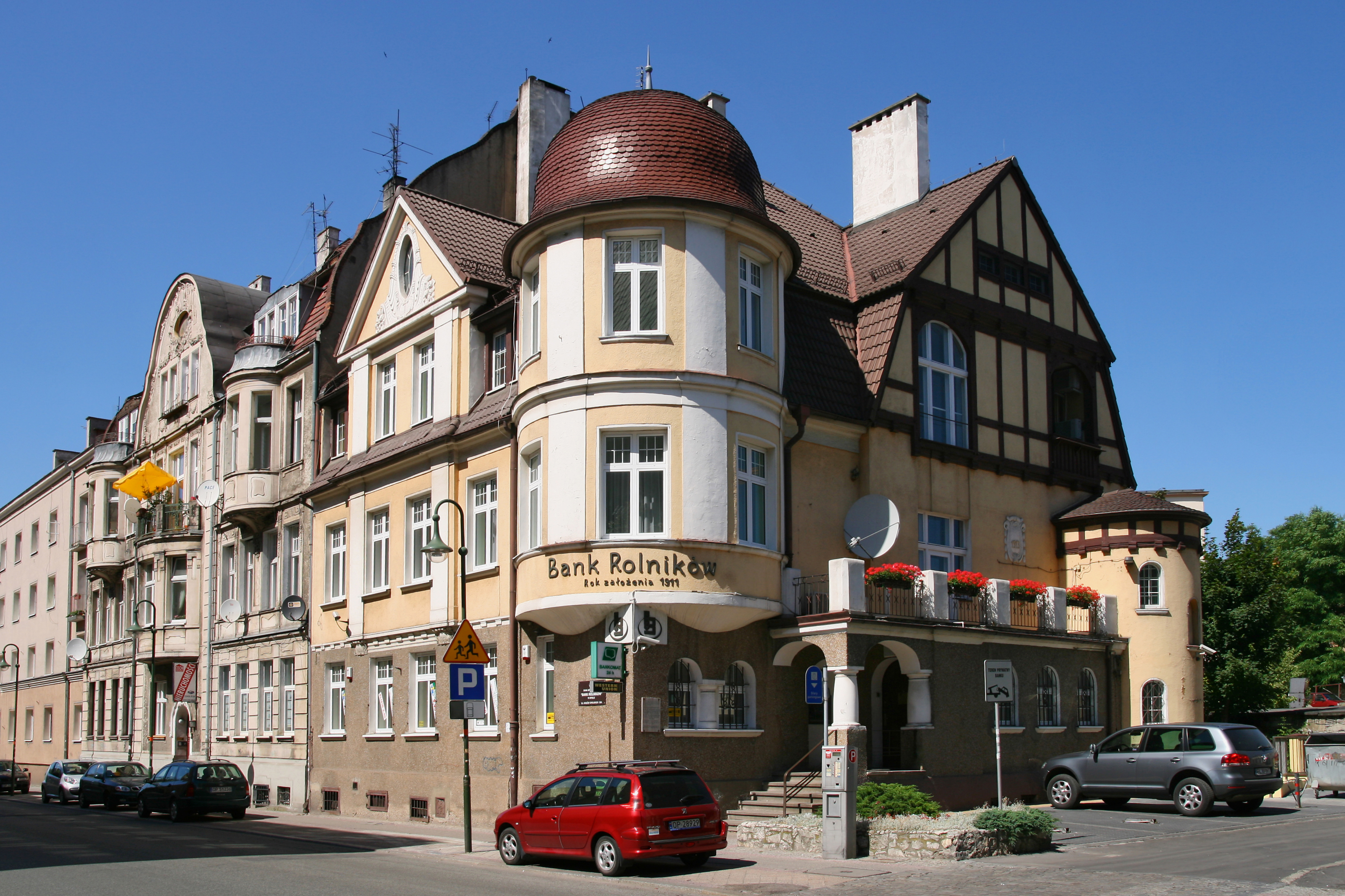 Budynek Banku Rolników w Opolu.